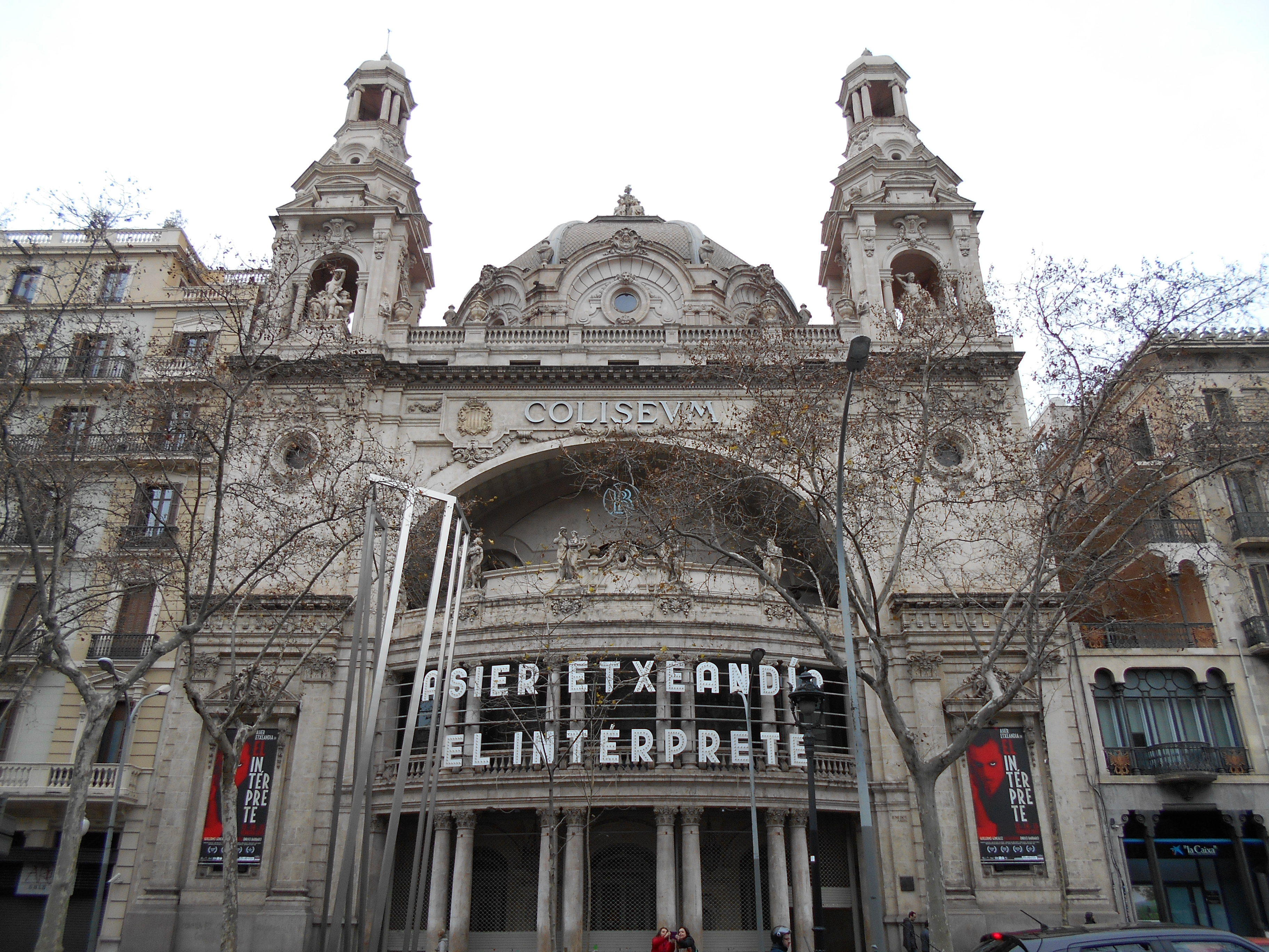 Cinema Coliseum.